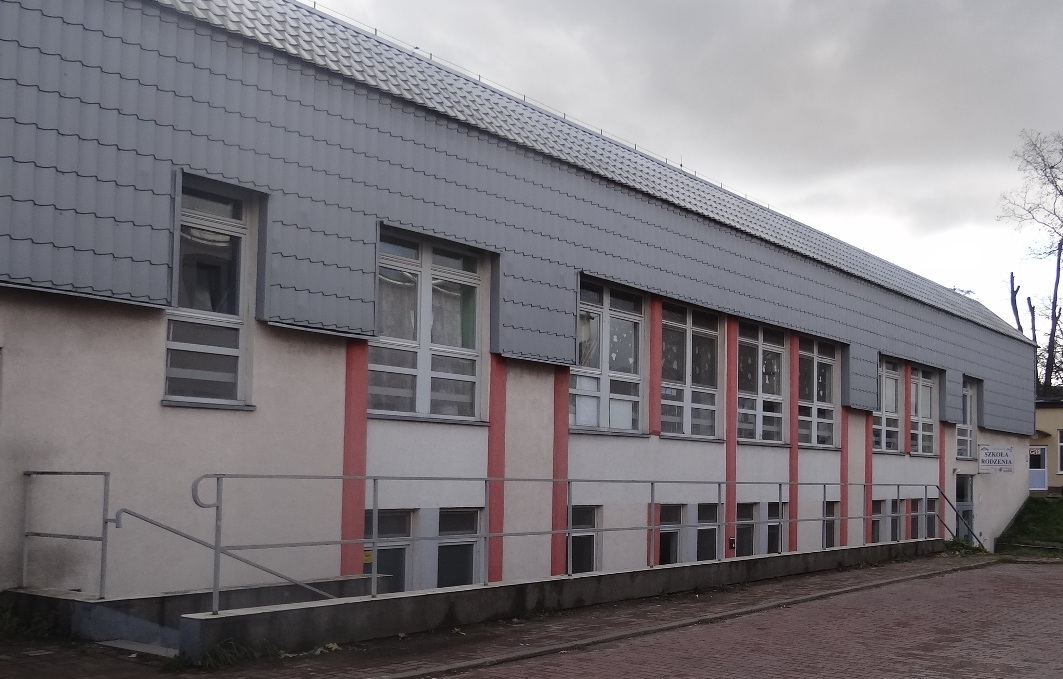 Kuchnia Szpitala Powiatowego SPW ZOZ ( tutaj jest też Szkoła Rodzenia) (2015)